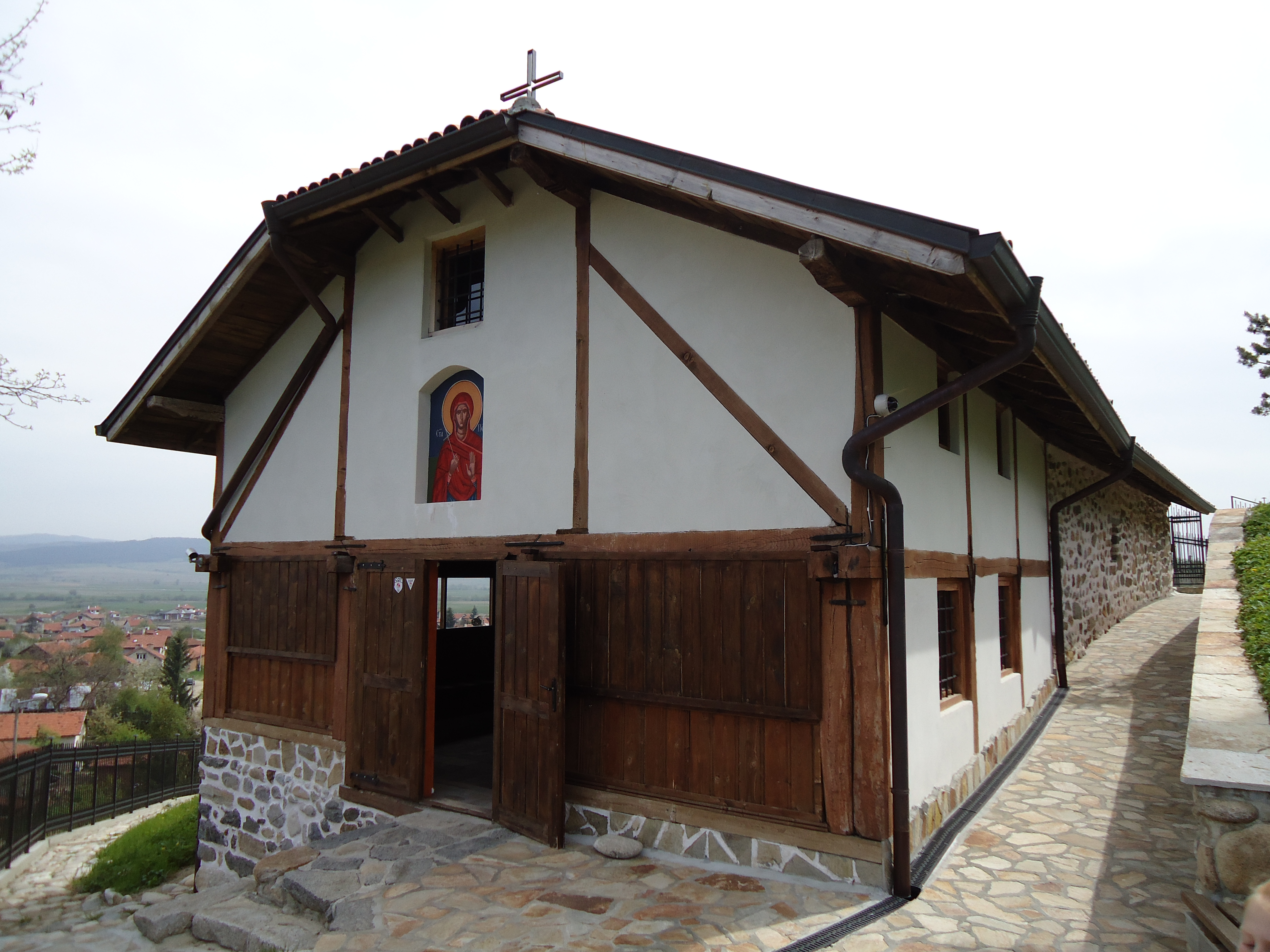 Църква "Света Петка" - с.Белчин ХVІІ в.